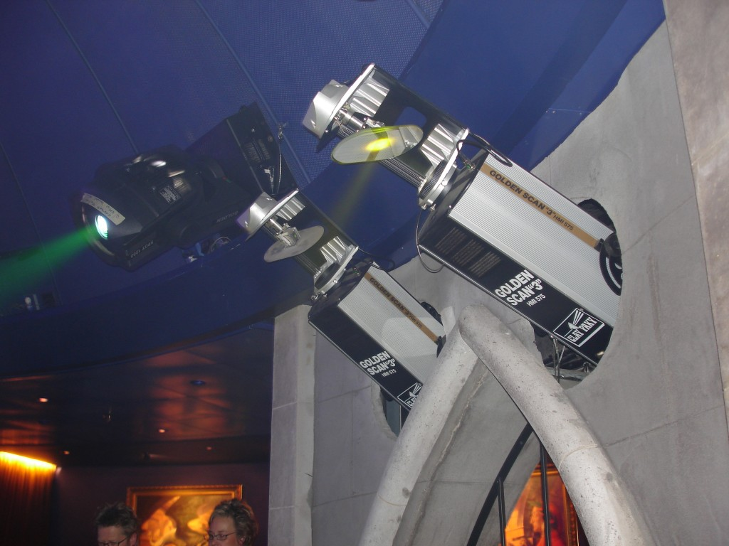 2 Spiegelscanner von Typ GoldenScan 3 des Herstellers Clay Paky (I) in der Diskothek "Tower" auf dem Schiff "Color-Fantasy"